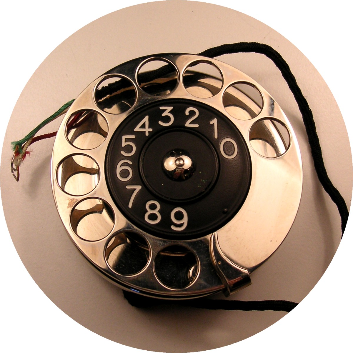 Wahlscheibe, Vorderseite